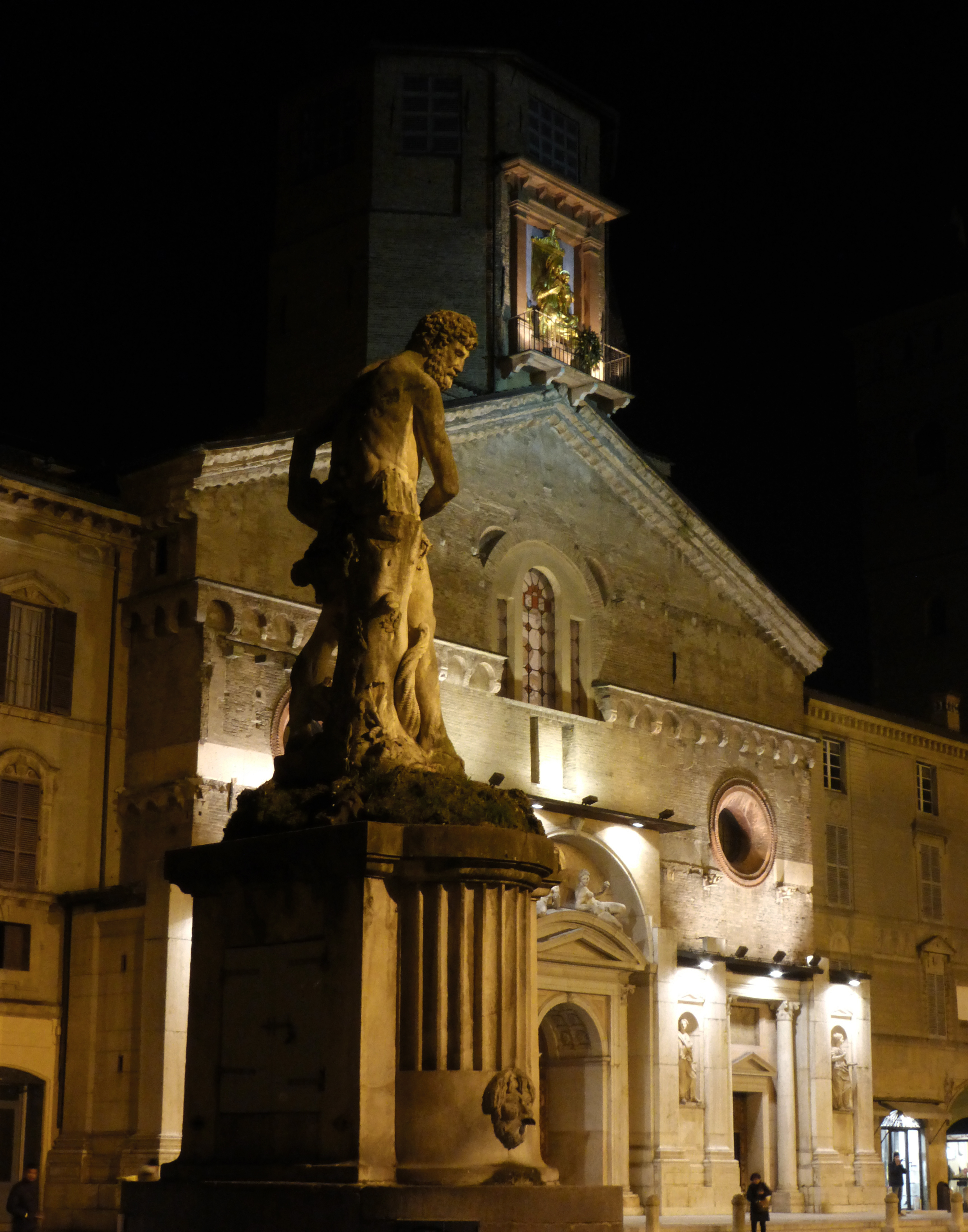 Vista notturna della statua del Crostolo (primo piano) e del duomo (sfondo), Reggio Emilia